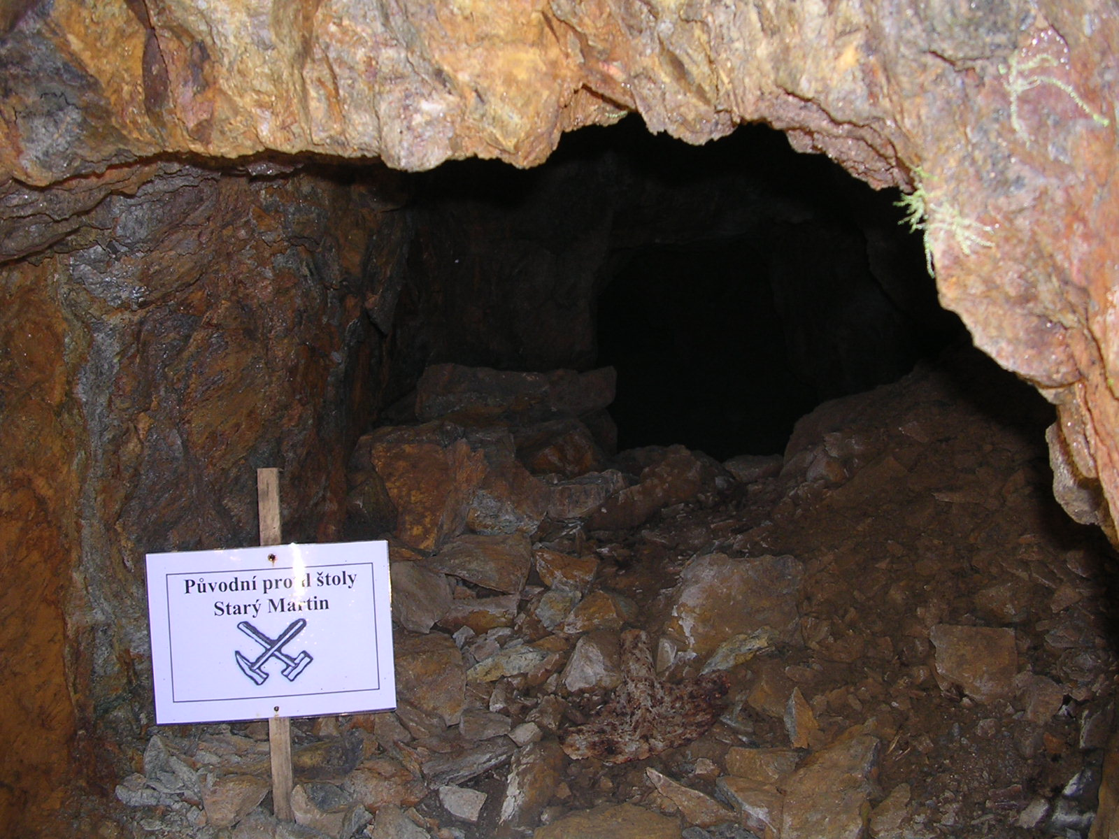 Štola Starý Martin, prohlídková štola, Horní Krupka